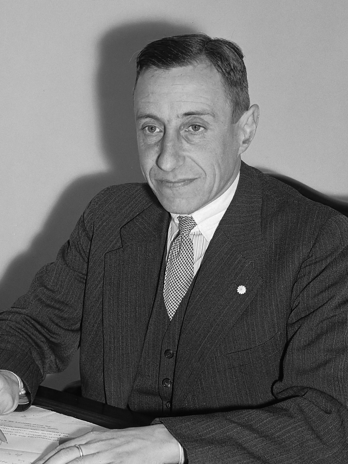 Prof. Dr. J.E. de Quay, minister van Oorlog 1945